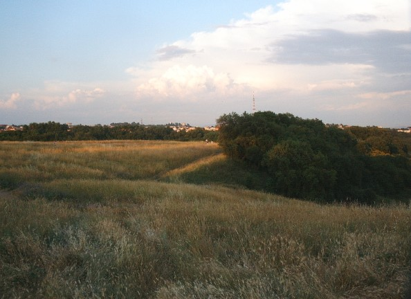 Parco del Pineto. foto di vinc81. roma giugno 2006